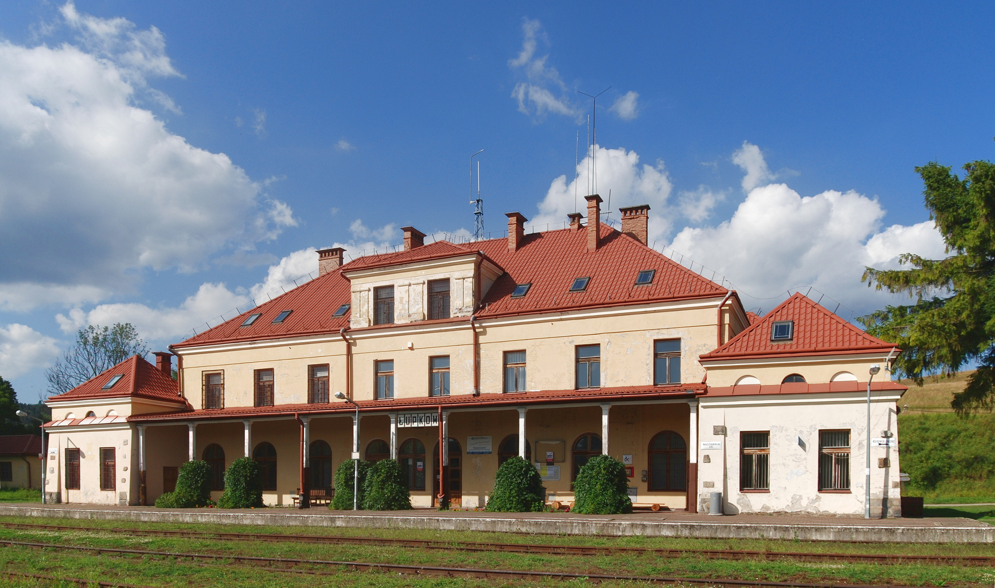 osada Stary Łupków